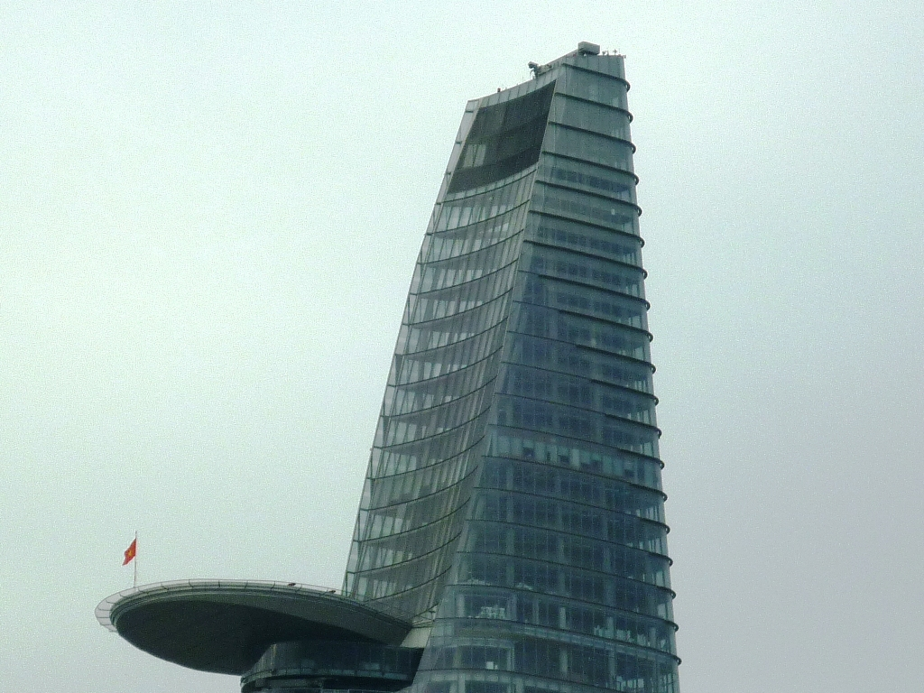 Sân đỗ trực thăng của cao ốc Bitexco Tower